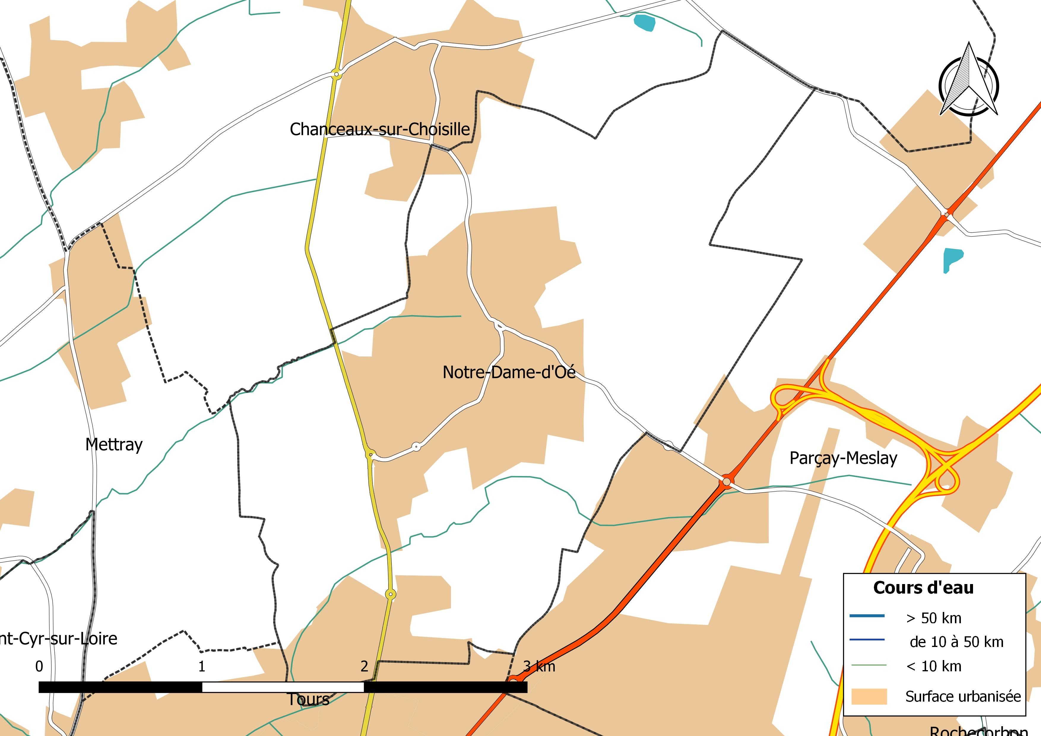 Carte du réseau hydrographique de la commune de Notre-Dame-d'Oé (France).